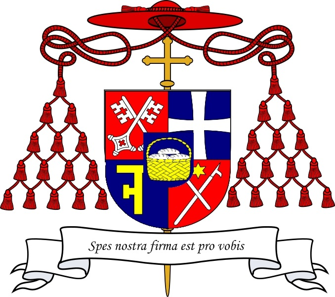 Wappen (1983-1989) von Joachim Meisner als Kardinal und Bischof von Berlin